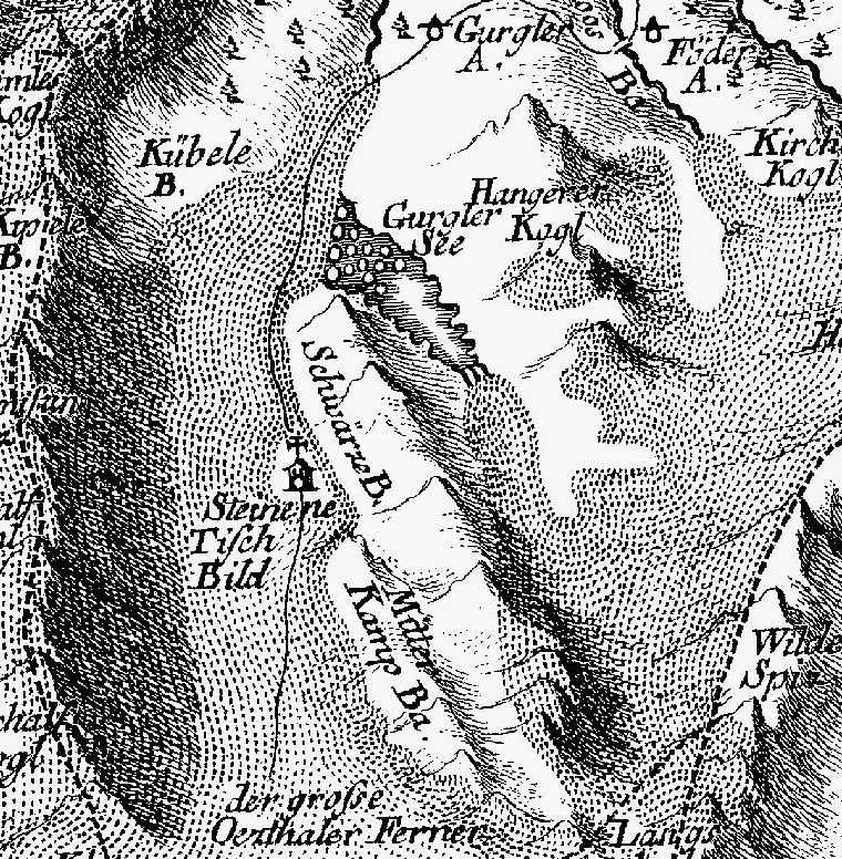 Der Gurgler See in den Ötztaler Alpen, Ausschnitt aus dem Atlas Tyrolensis von Peter Anich und Blasius Hueber (1774)